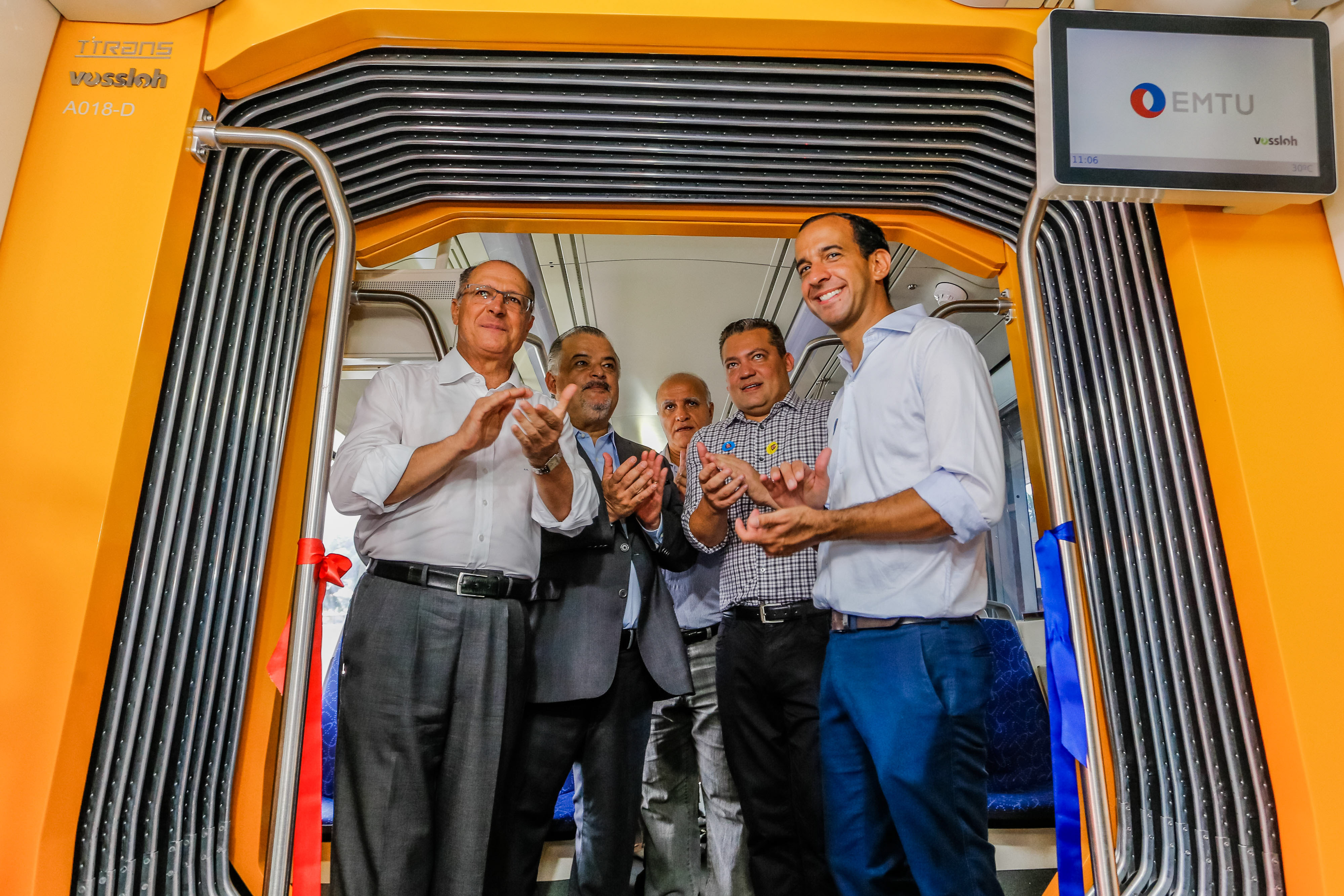 O Governador do Estado de São Paulo, Dr. Geraldo Alckmin, entregou as Estações Ana Costa, Washington Luís, Porto e Terminal Barreiros para operação e além de dois novos trens, do VLT, da EMTU/SP. Local: Santos/SP. Data: 31/01/2017. Foto: Alexandre Carvalho/A2img